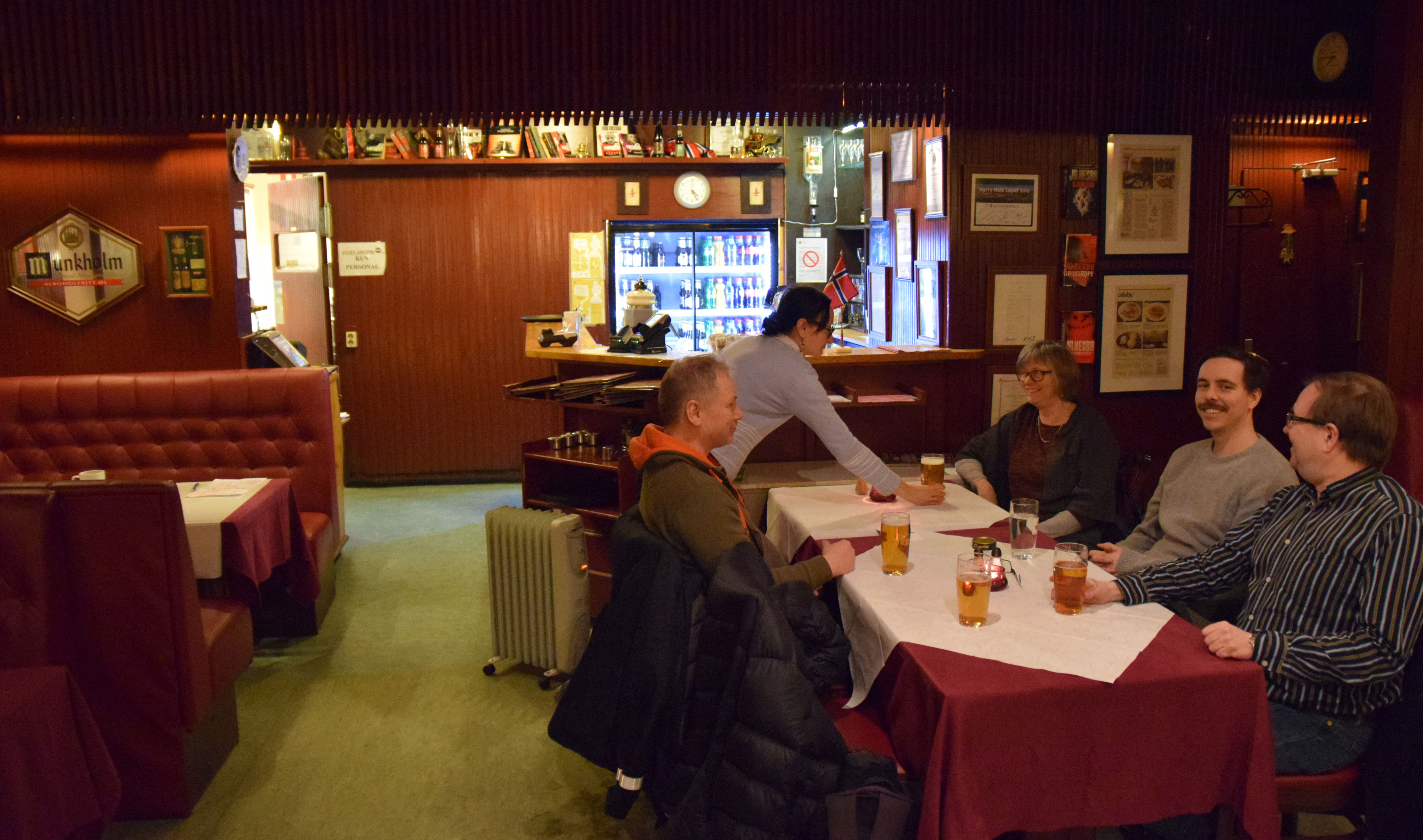 Restaurant Schrøder, St. Hanshaugen, Oslo, arealet innerst i restauranten. Publisert med tillatelse fra Restaurant Schrøder